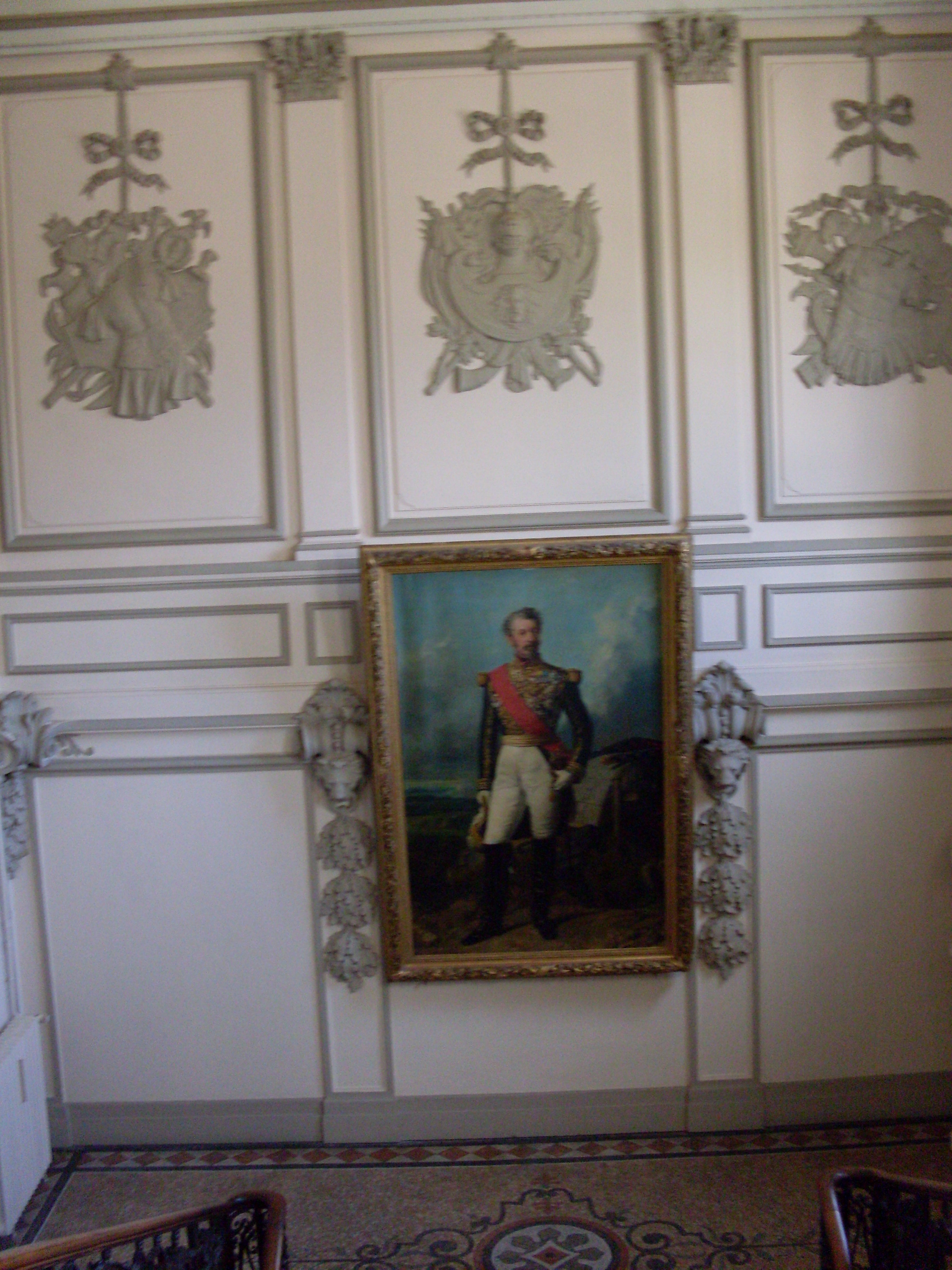 Le Palais Niel, portrait d'A. Niel par Larivière, Toulouse